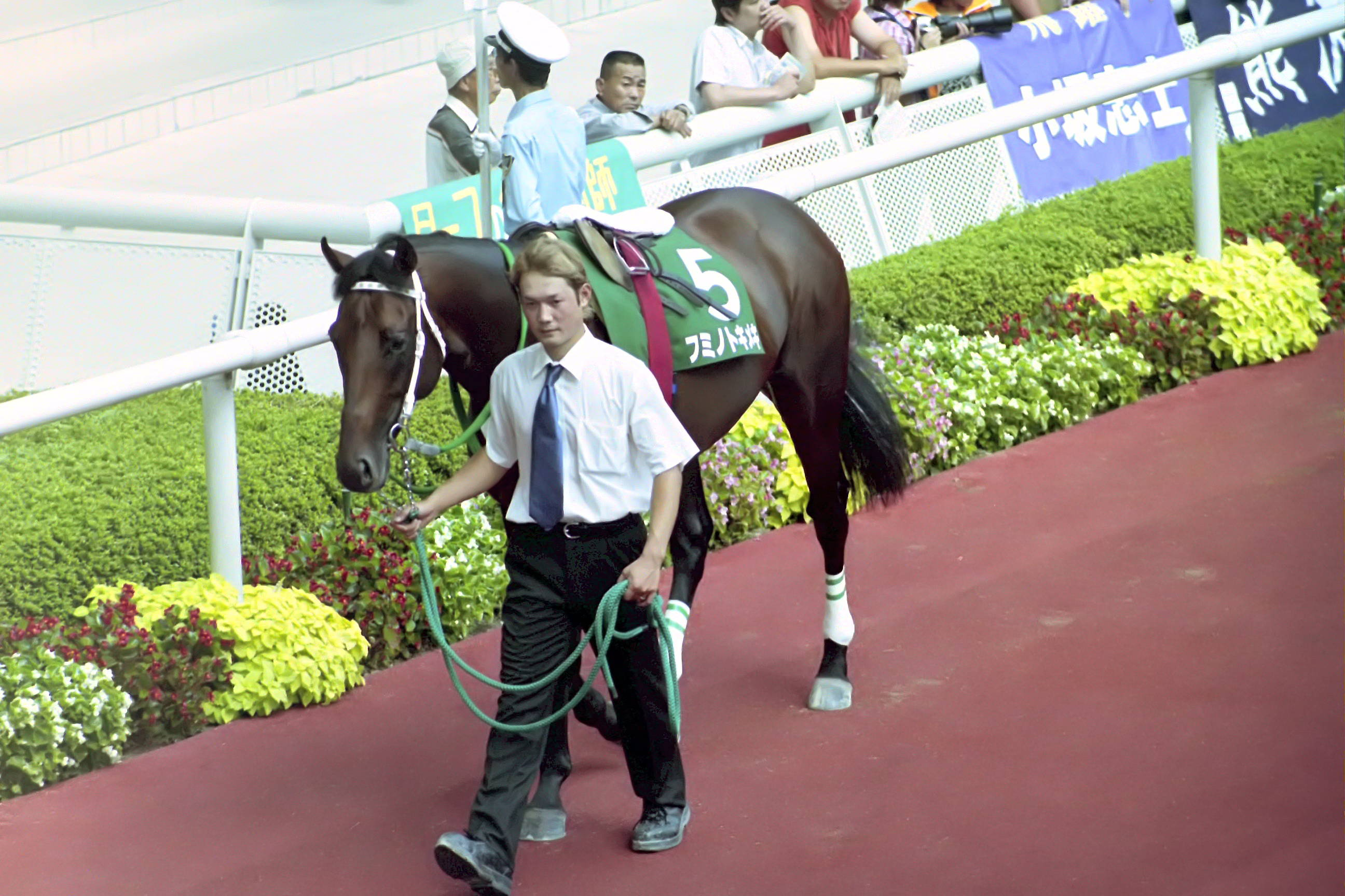 フミノトキメキ